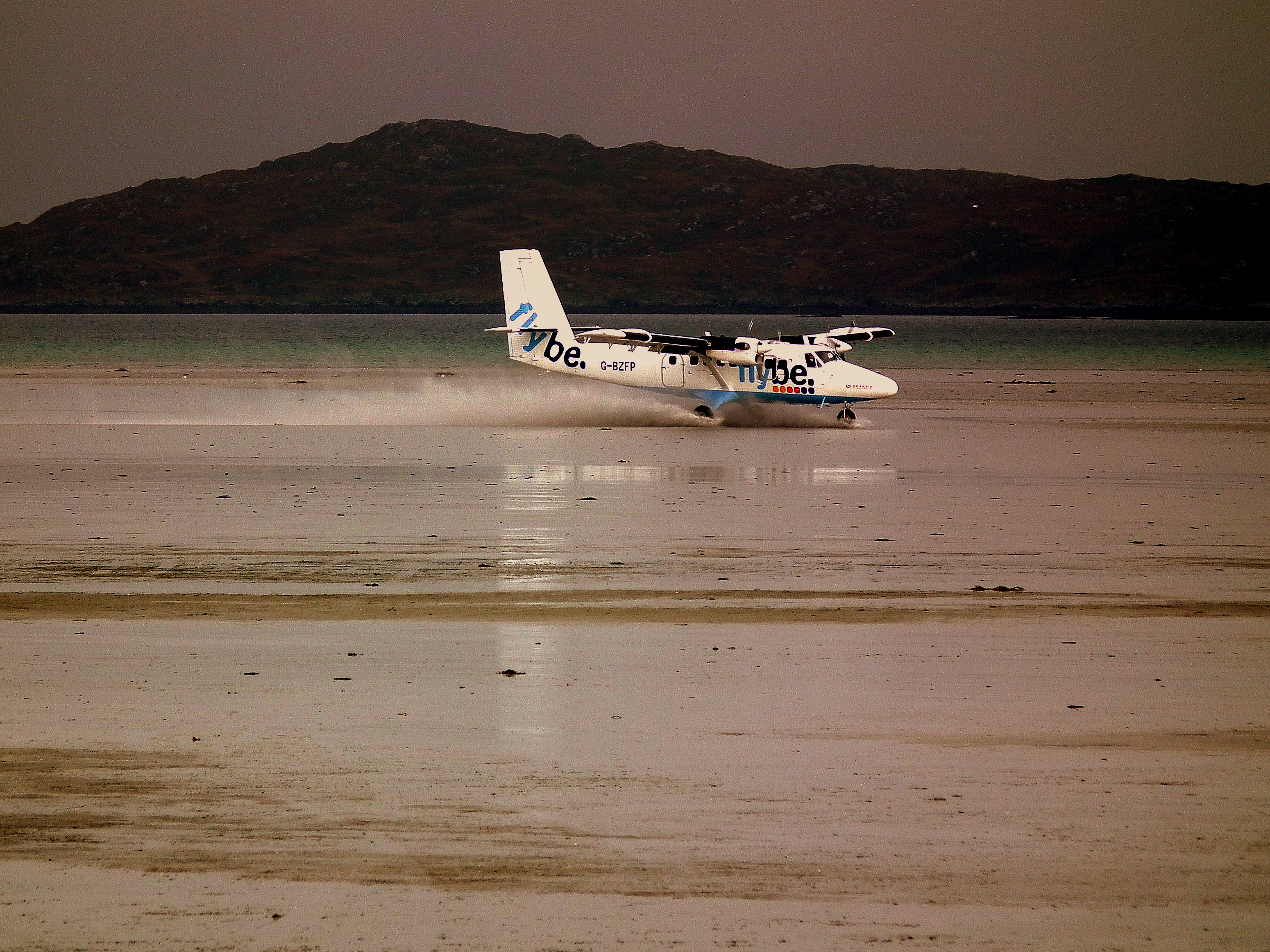 BARRA BEACH AIRPORT SEP 2010